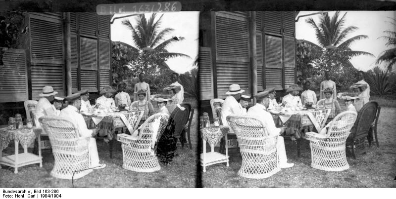 Kamerun, Duala, Deutsche Siedler Duala.- Nach dem Schießen bei Hauptmann Langheld [Kamerun, Duala.- Angehörige der Schutztruppe nach Schießübungen zu Besuch bei Hauptmann Lengeld, mit Damen im Garten am Tisch sitzend]